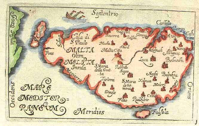 Mapa Malty zo 17. storočia Die Insel Malta im 17. Jahrhundert. Aus: Gabriel Bucelin: Historiae universalis cum sacrae, tum profanae nucleus... Ulm 1650 licencia: Public Domain